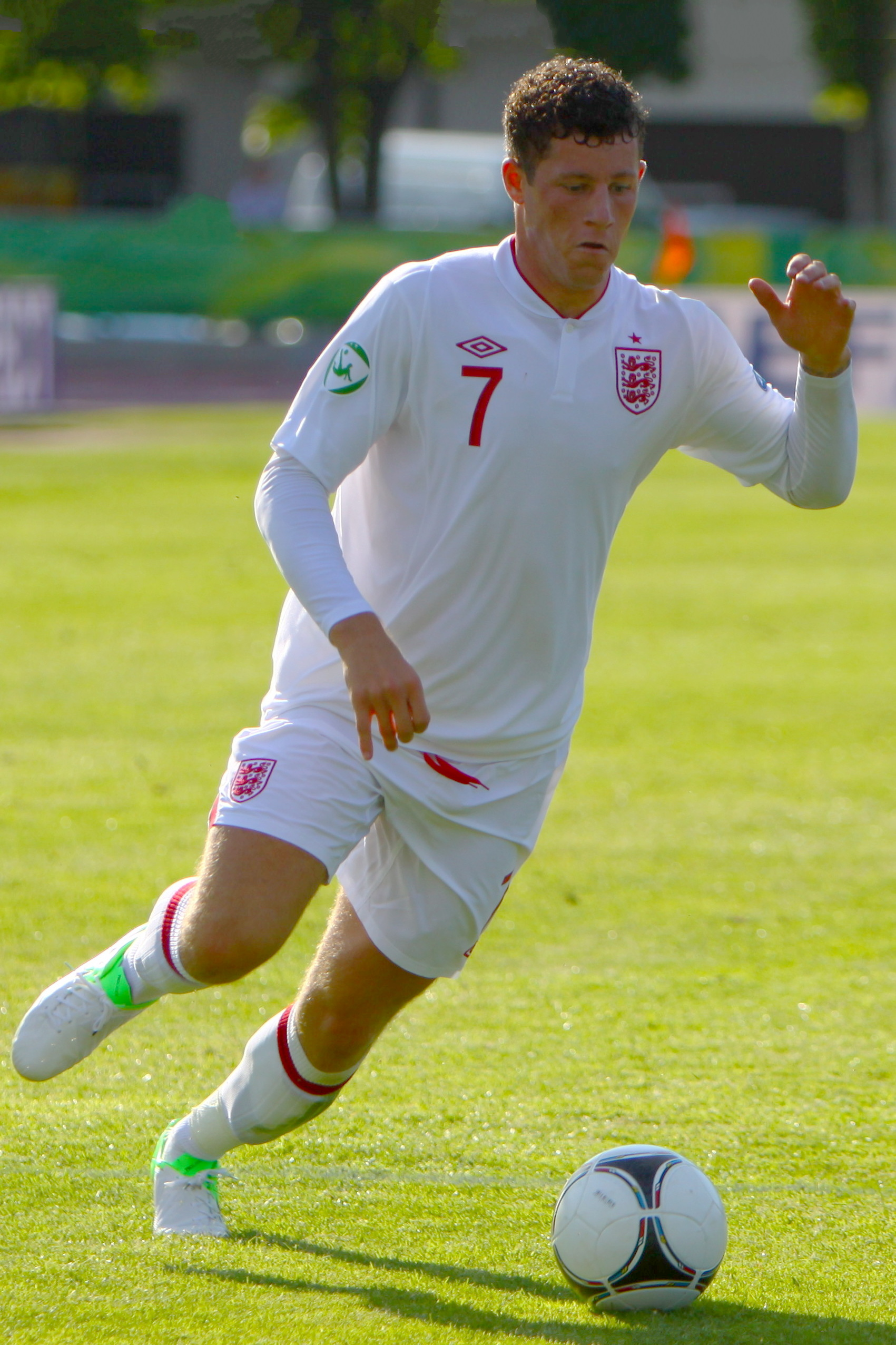 Ross Barkley